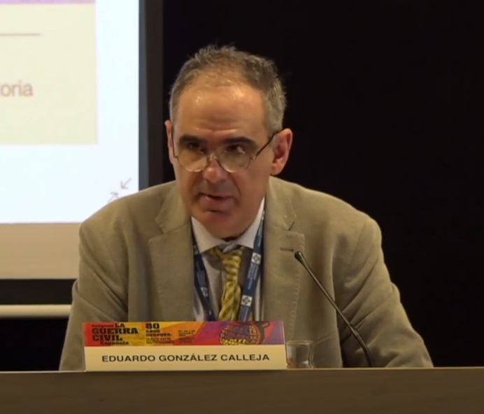 ¿Por qué la Guerra Civil? La Primavera Trágica de 1936. Congreso La Guerra Civil Española: 27, 28 y 29 de noviembre de 2019.